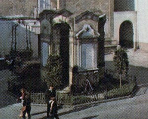 Monumento caduti